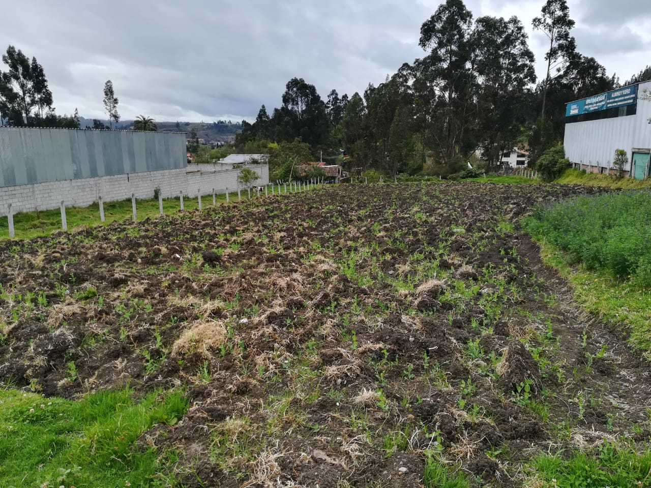 Sembrio de arvejas en el Barrio Unión y Progreso en la Parroquia de Paccha